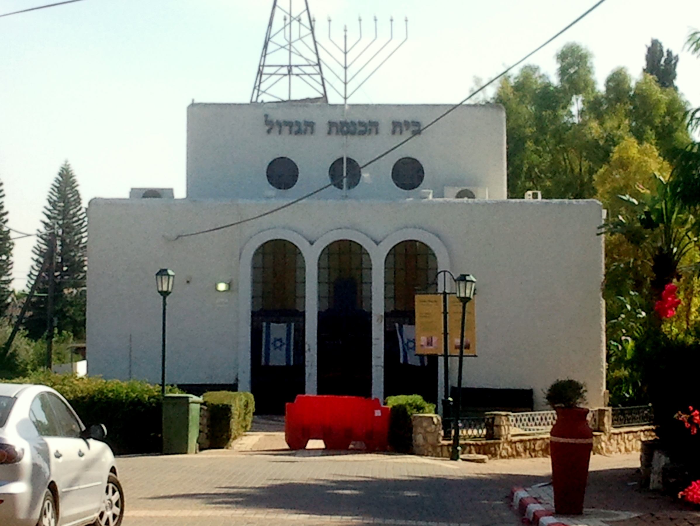 בית הכנסת של כפר תבור